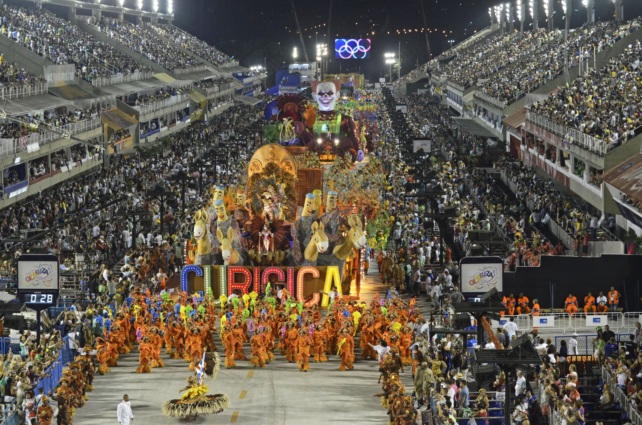 Rio de Janeiro - Primeiro dia de desfile das escolas de samba do grupo de acesso na Sapucai. (Alexandre Macieira/Agência Brasil)